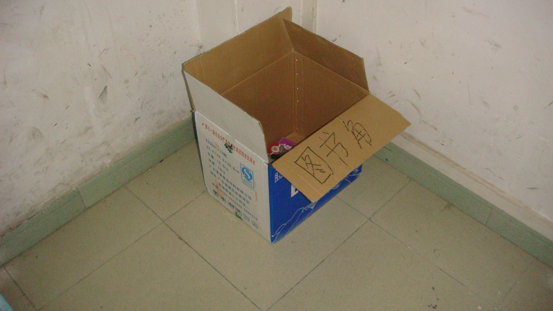 Tushujiao